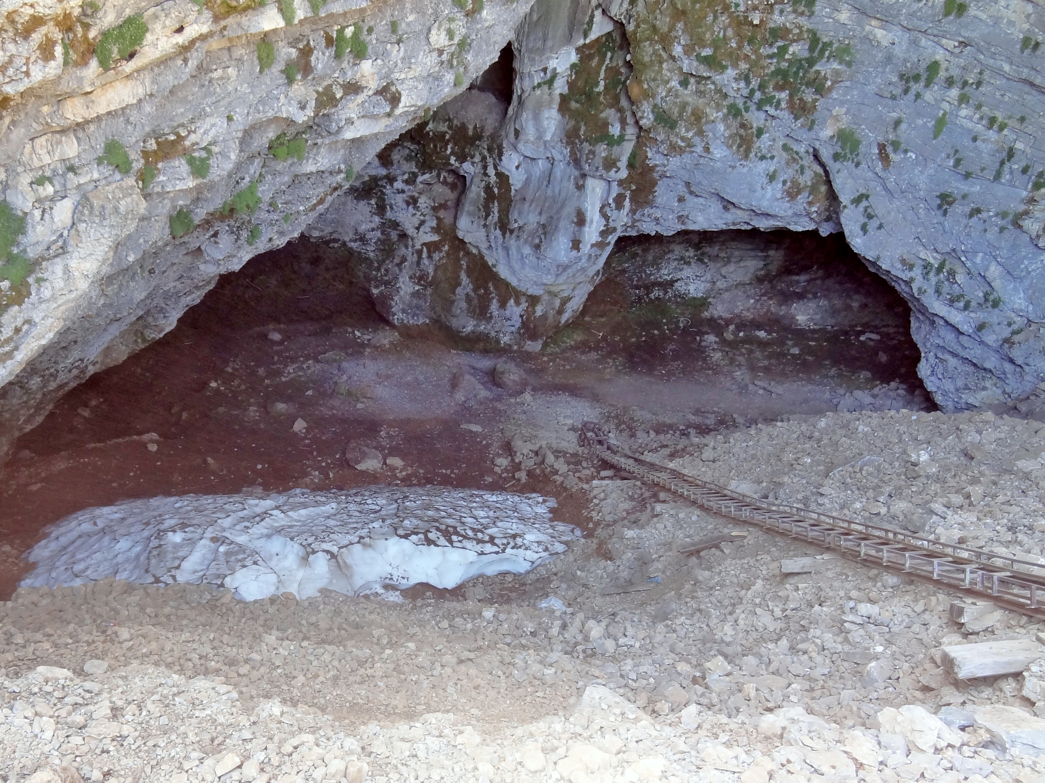 Idäische Grotte an der Nida-Hochebene, Gemeinde Anogia, Regionalbezirk Rethymno, Kreta, Griechenland